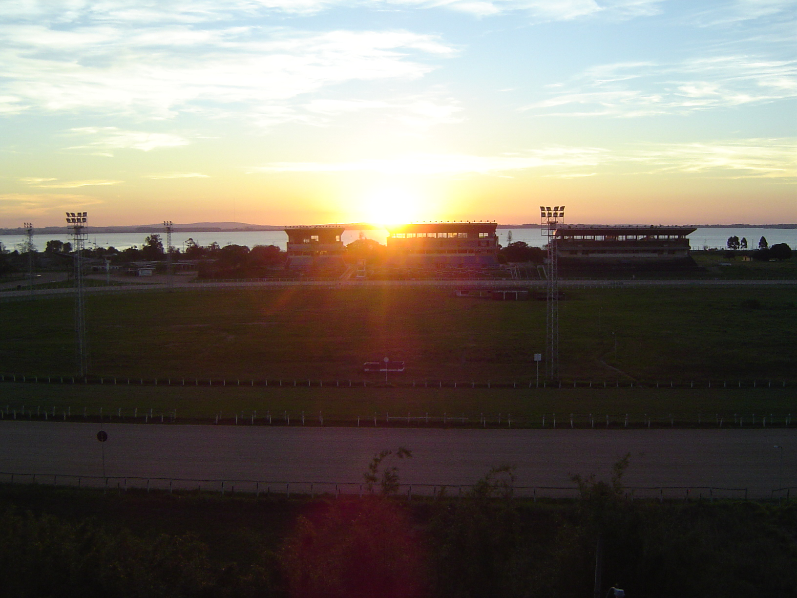 Foto tirada no feriado de 7 de setembro de 2005, quarta-feira; no bairro Cristal em Porto Alegre. (por TRISSIX - Rodrigo Bueno Prestes)